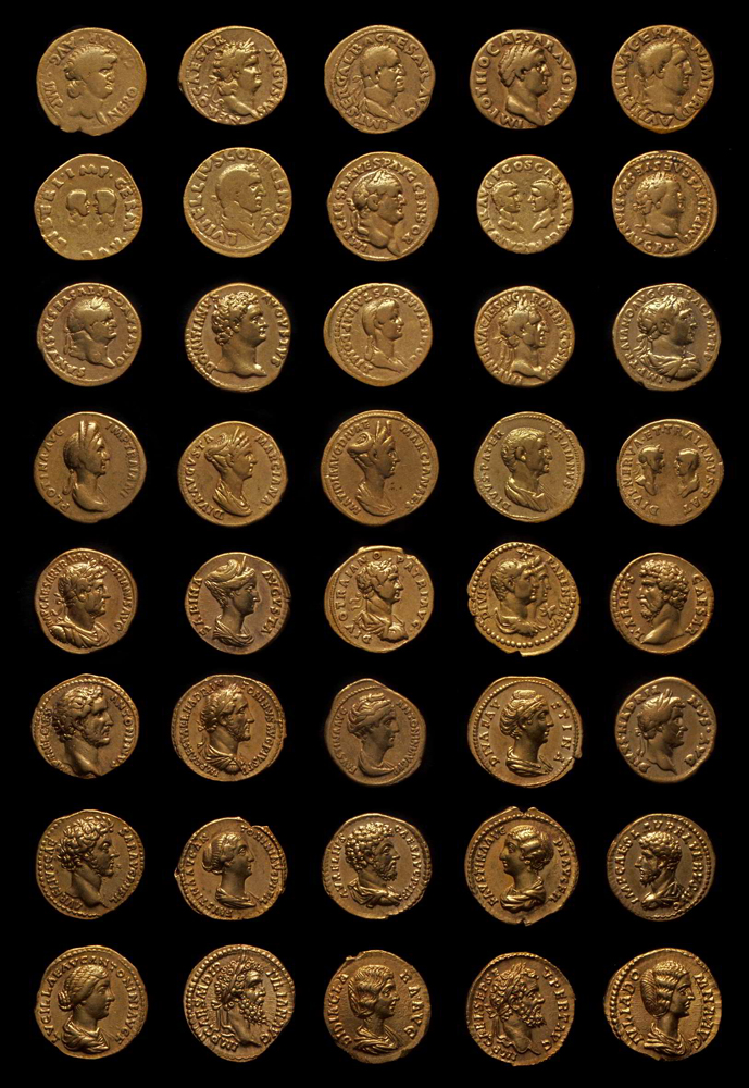 Unterschiedliche Münztypen des römischen Goldmünzenschatzes aus der Feldstraße in Trier.